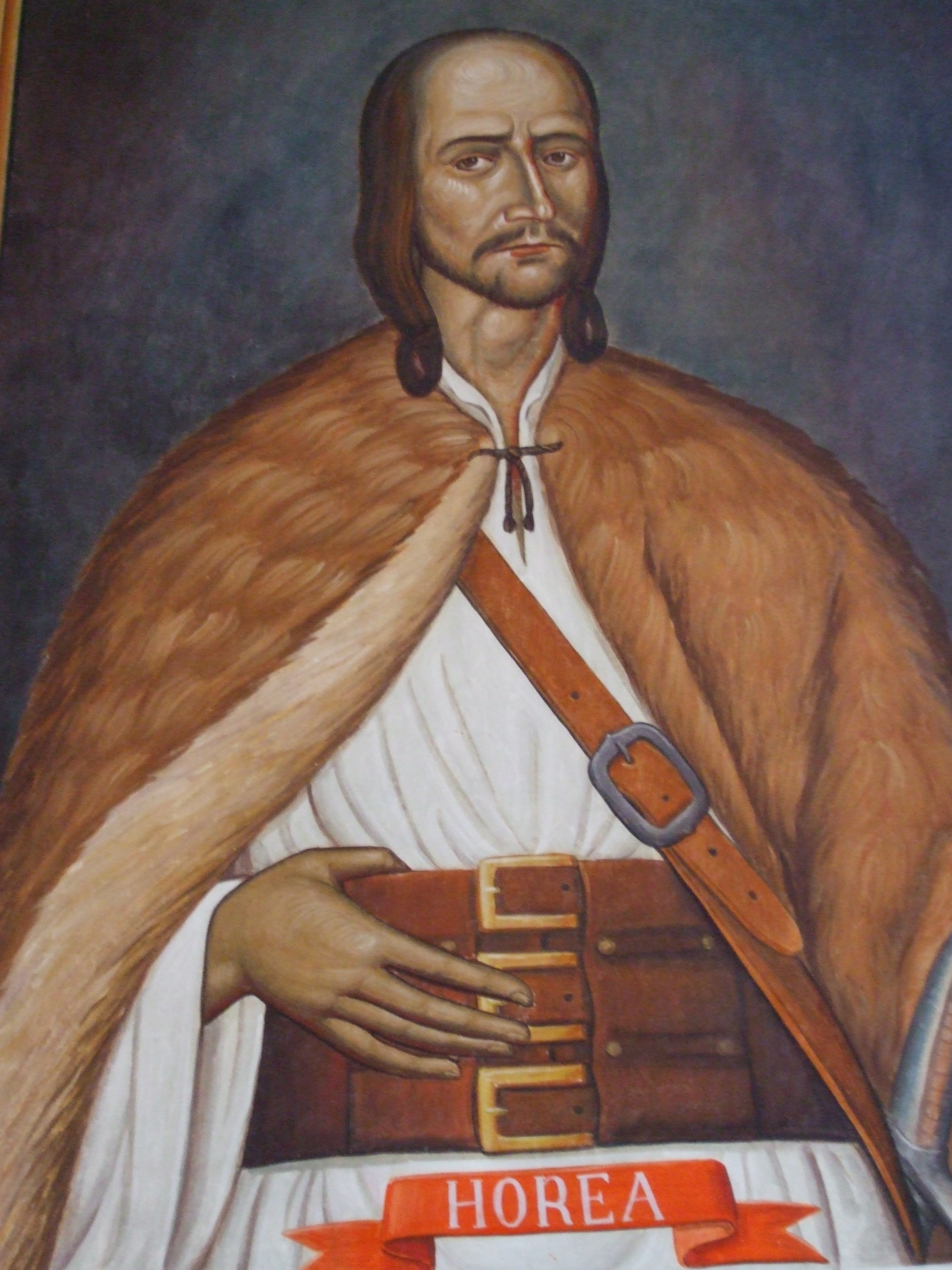 Horea - imagine pictată in biserica din comuna Horea, Alba.